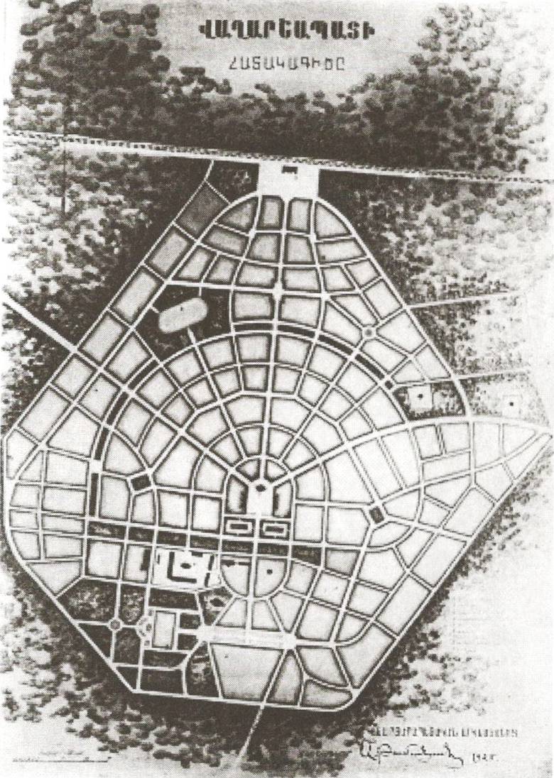 Վաղարշապատ քաղաքի հատակագիծը